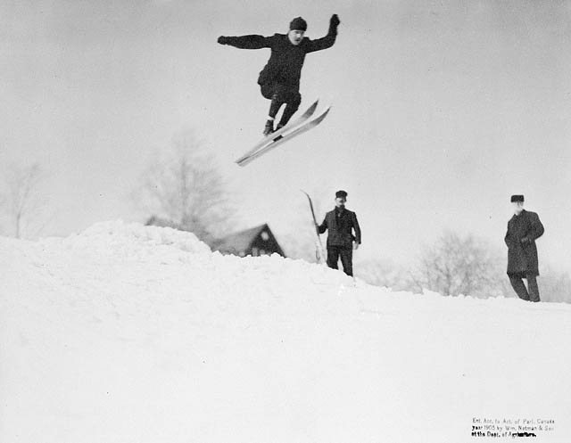 Ski jumping